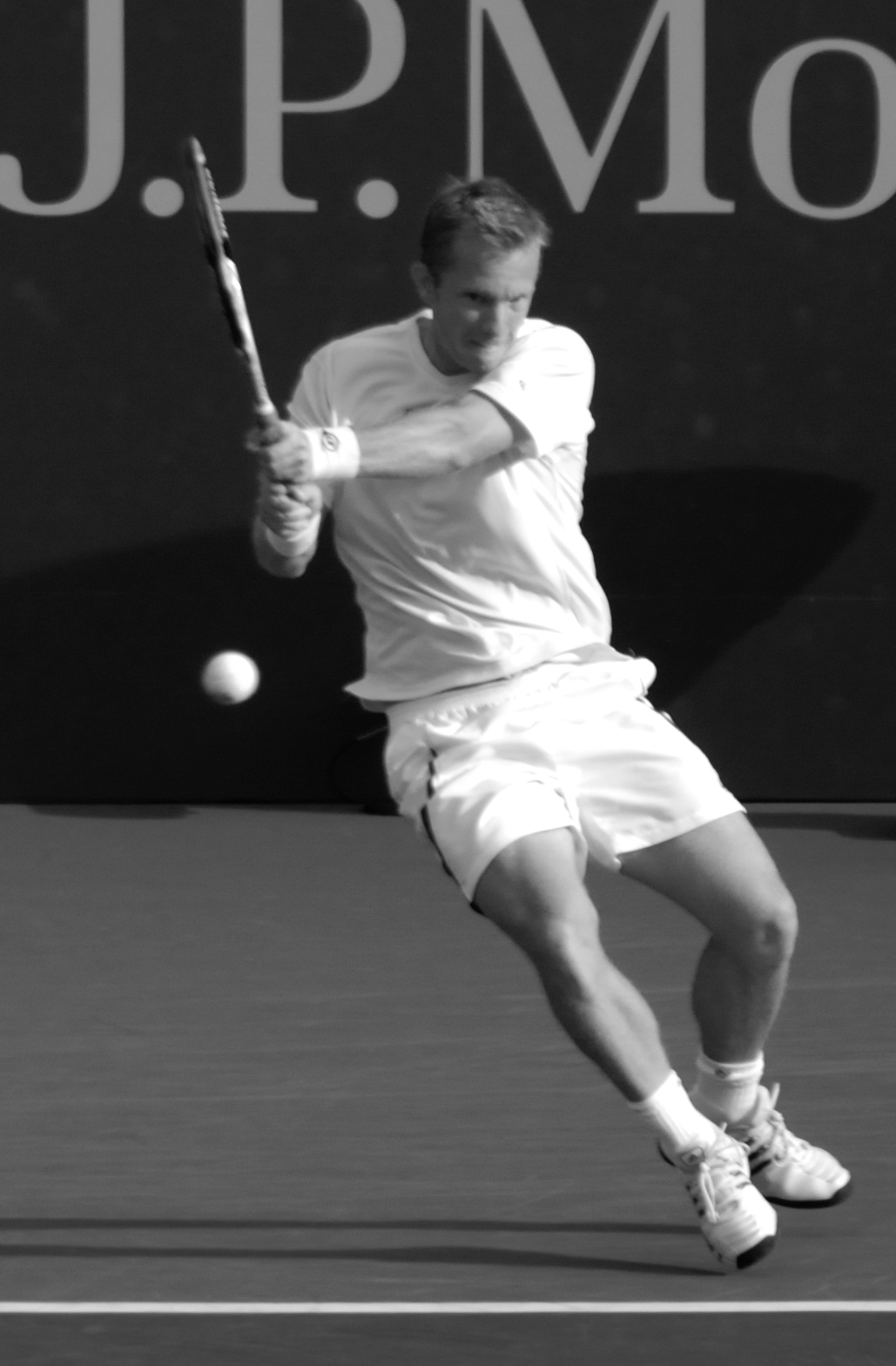 Thomas Johansson